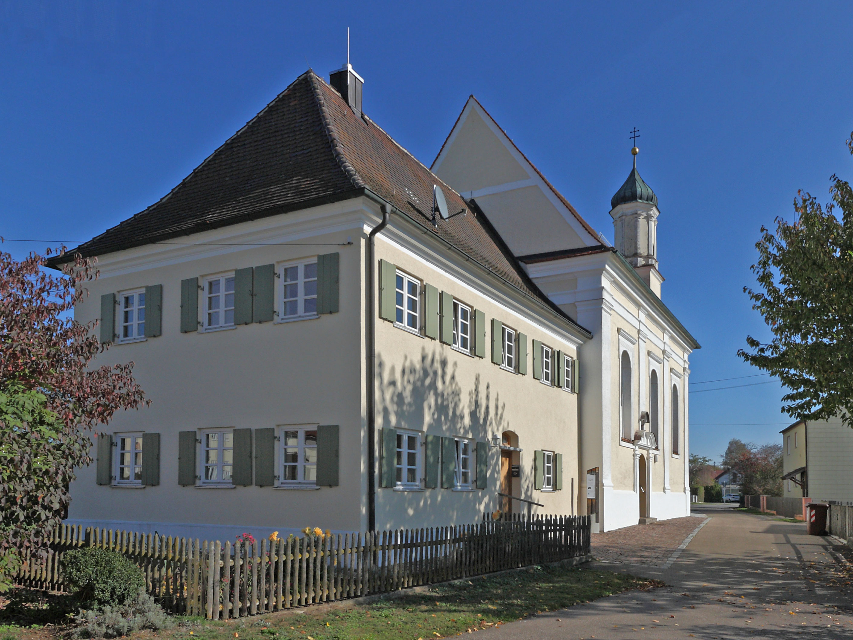 Neuhäder, Marienstraße 4a, Gemeinde Dinkelscherben; ehem. Benefiziatenhaus mit der Marienkapelle, 1727 erbaut